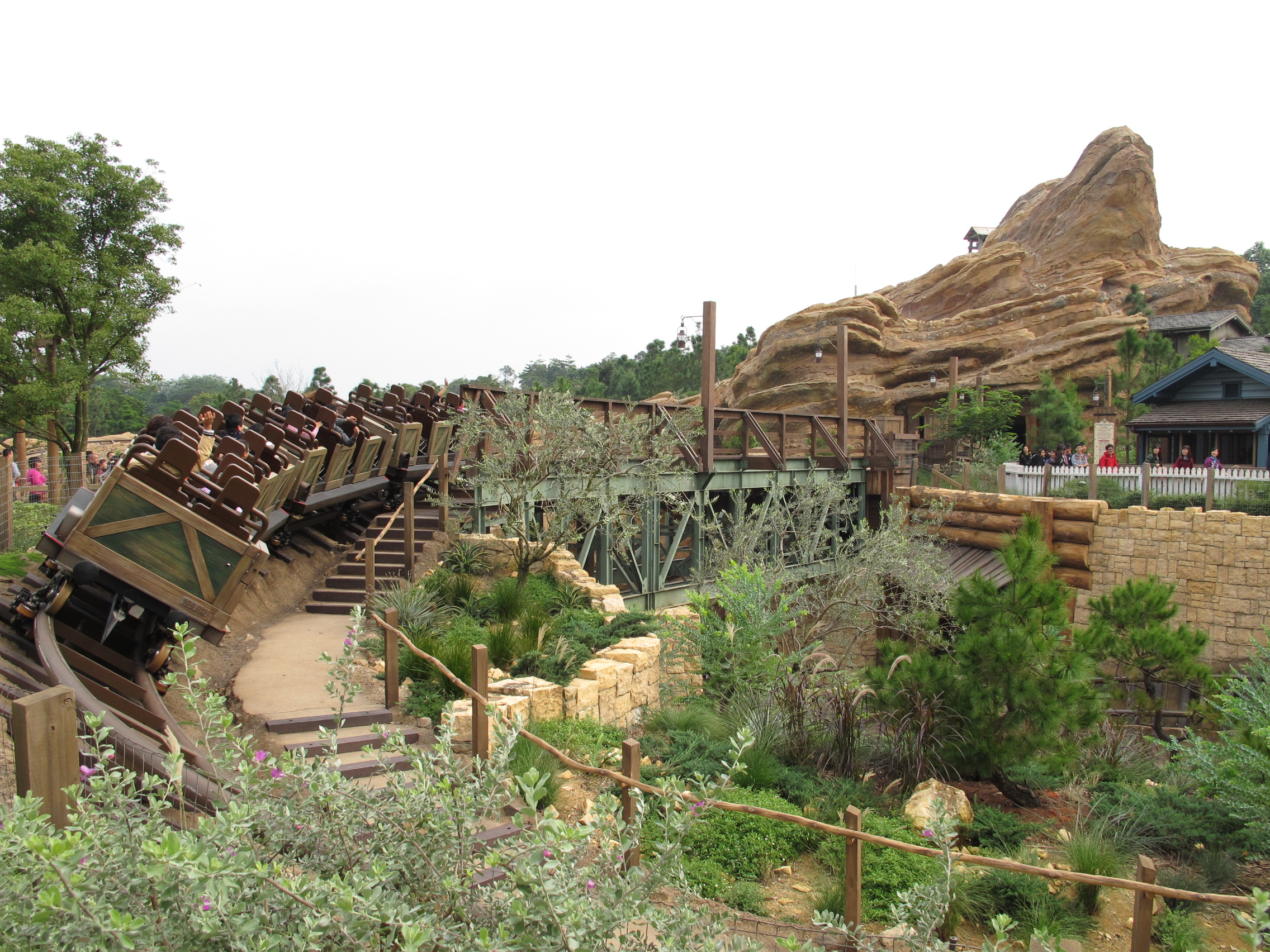 Hong Kong Disneyland Grizzly Gulch